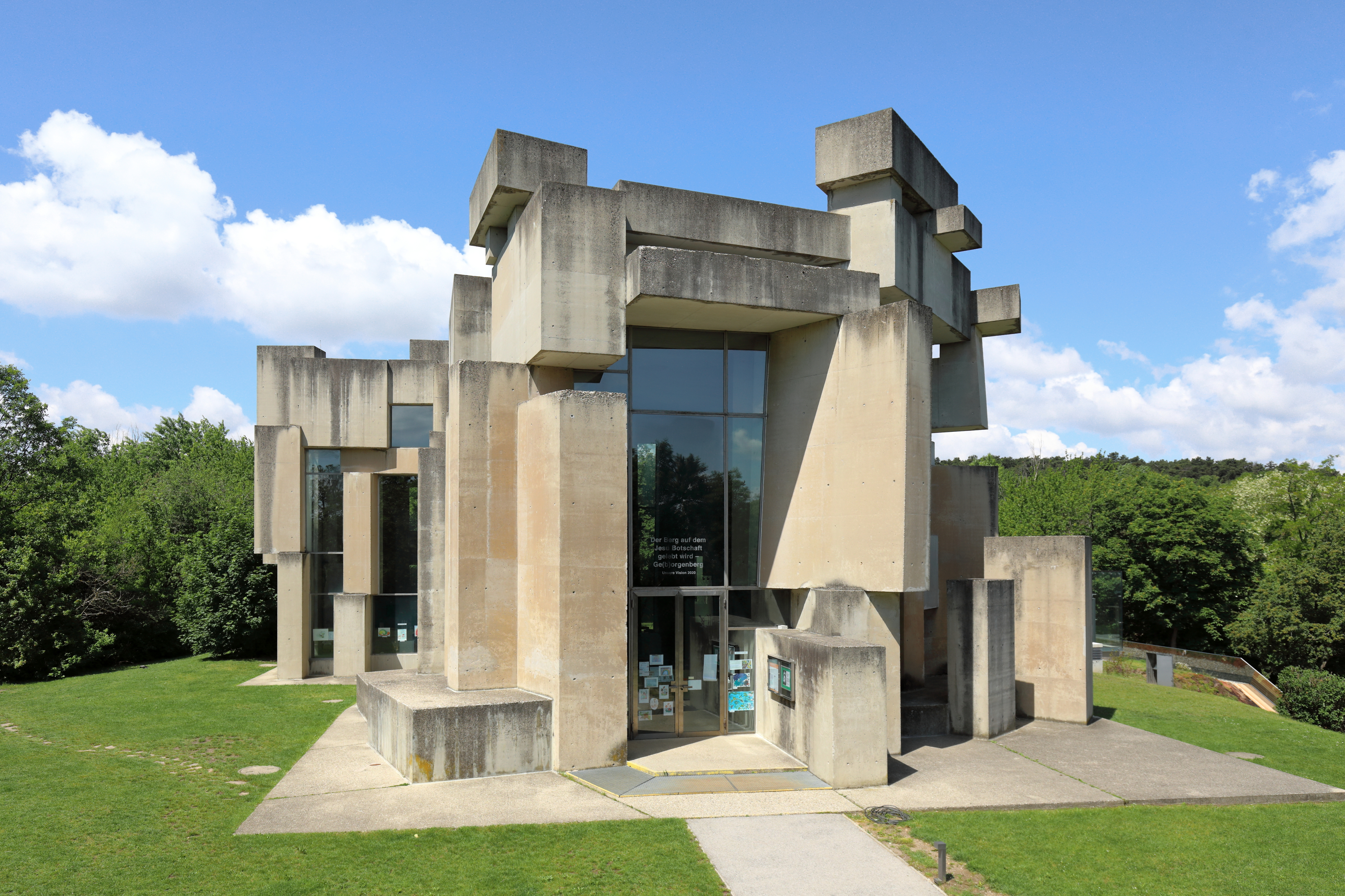 Ostansicht der Wotruba- bzw. Dreifaltigkeitskirche auf dem Georgenberg im Wiener Stadtteil Mauer des 23. Gemeindebezirkes Liesing.Die Kirche im Stil des Brutalismus wurde auf Initiative von Margarethe Ottillinger (1919–1992) und nach einer Idee des Künstlers Fritz Wotruba (1907–1975) vom Architekten Fritz Gerhard Mayr (* 1931) errichtet. Der Entwurf für die Kirche (152 Betonblöcke mit einen Gesamtgewicht von über 4000 Tonnen, ohne Symmetrie aufeinander geschachtelt, mit schmalen, verschieden hohen Fensteröffnungen) wurde von Wotruba 1964 präsentiert. Wegen großem Widerstand konnte man erst 1974 mit dem Bau beginnen und zwei Jahre später, am 24. Oktober 1976, erfolgte die feierliche Einweihung durch Kardinal Franz König.